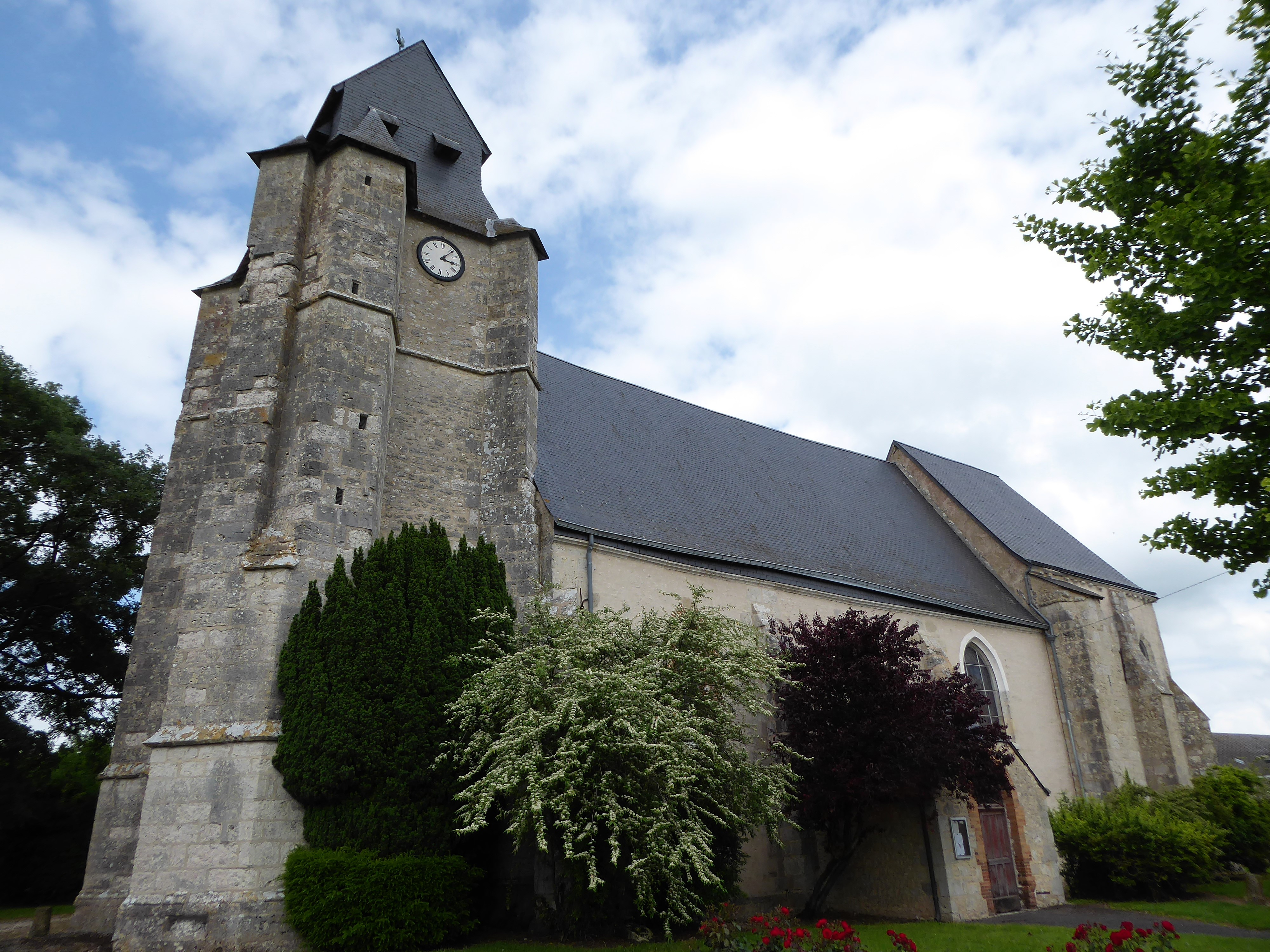 tour quadrangulaire et mur sud, église Saint-Pierre, Lumeau, Eure-et-Loir, France.